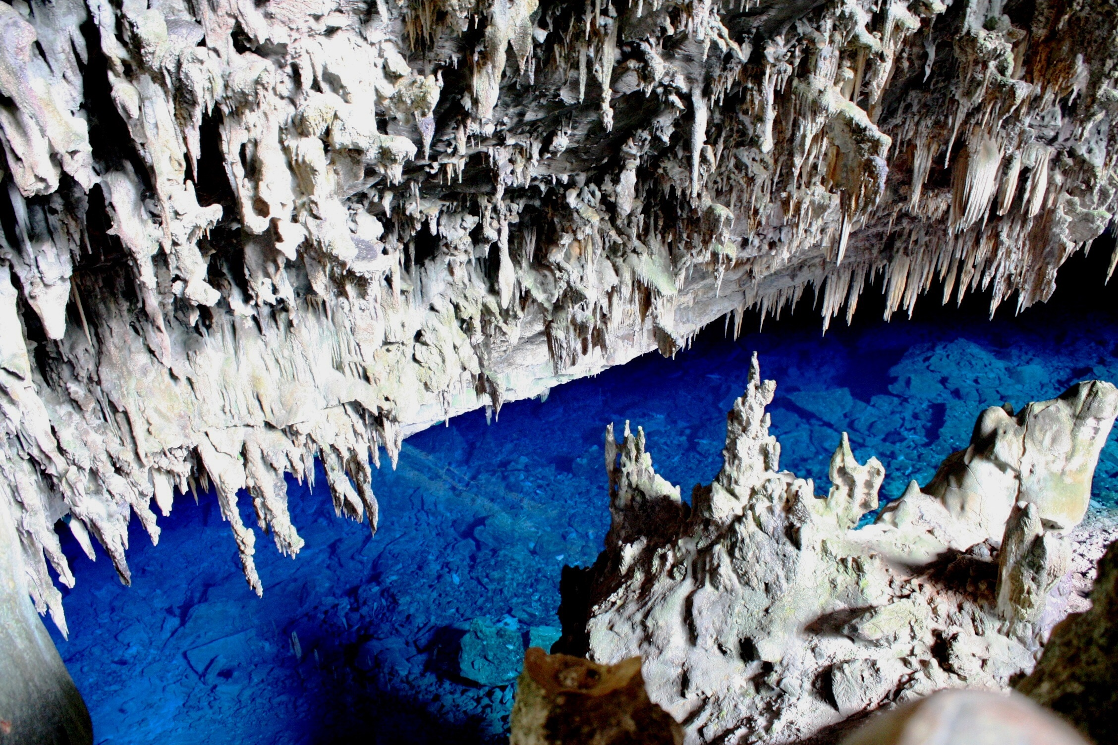 Gruta em Bonito MS